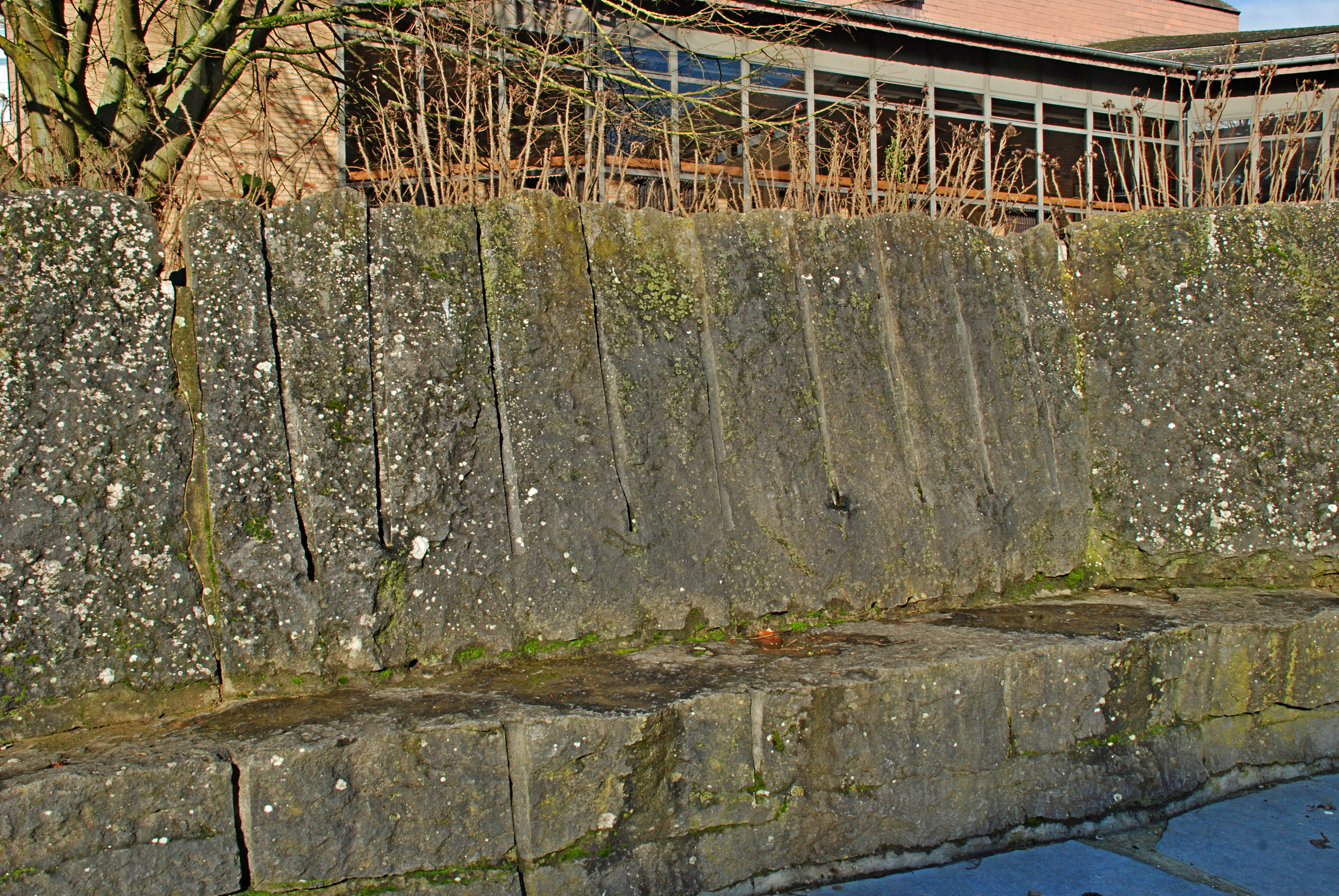 Belgique - Louvain-la-Neuve - Place Montesquieu- Ronde des menhirs (Pierre Culot 1980)